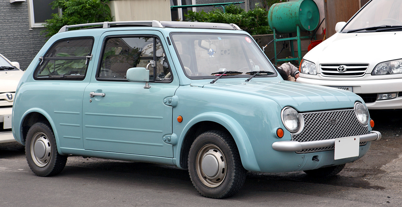 Nissan Pao Canvas Top ( PK10 )